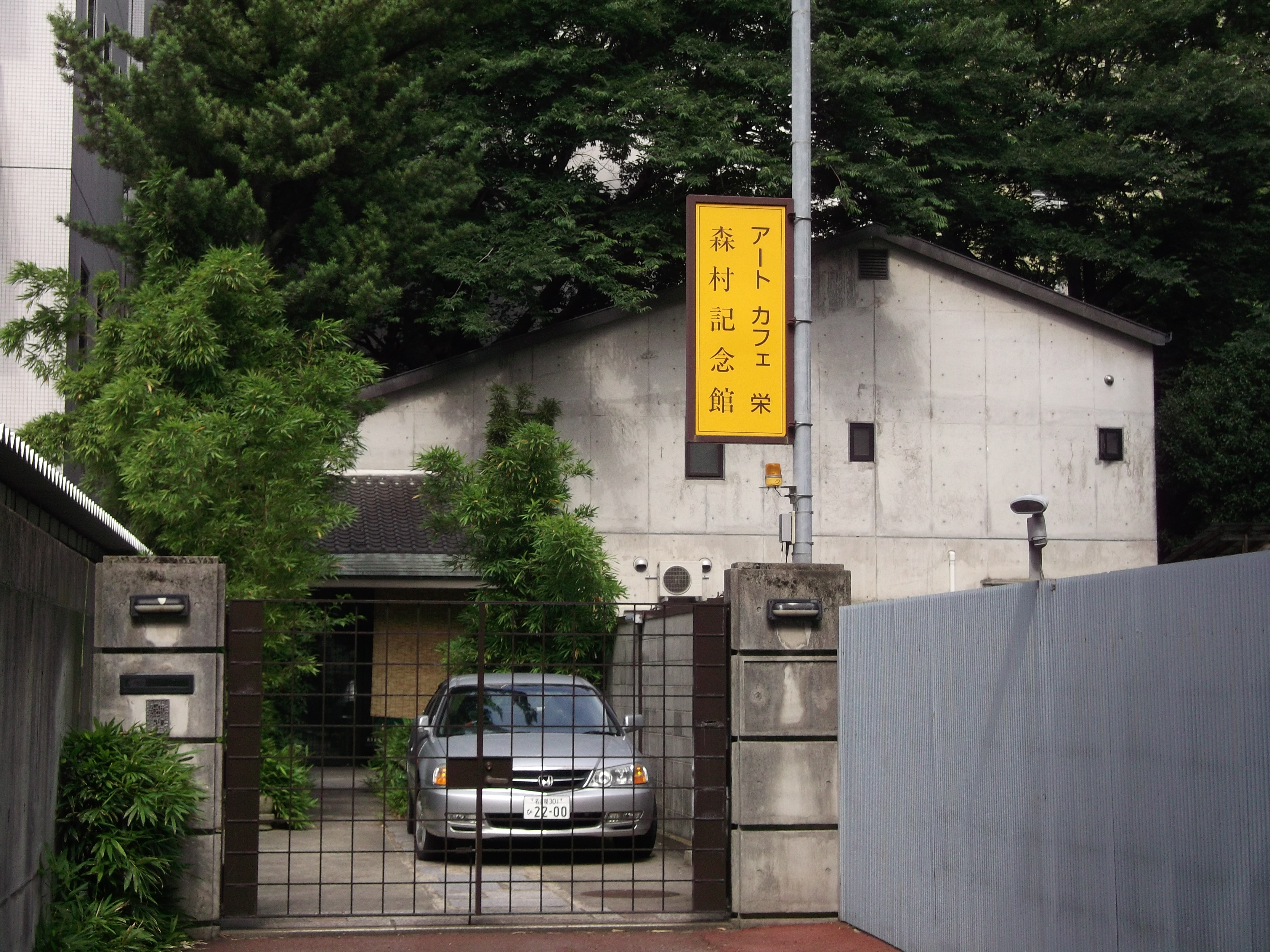 名古屋市東区東桜の森村記念館